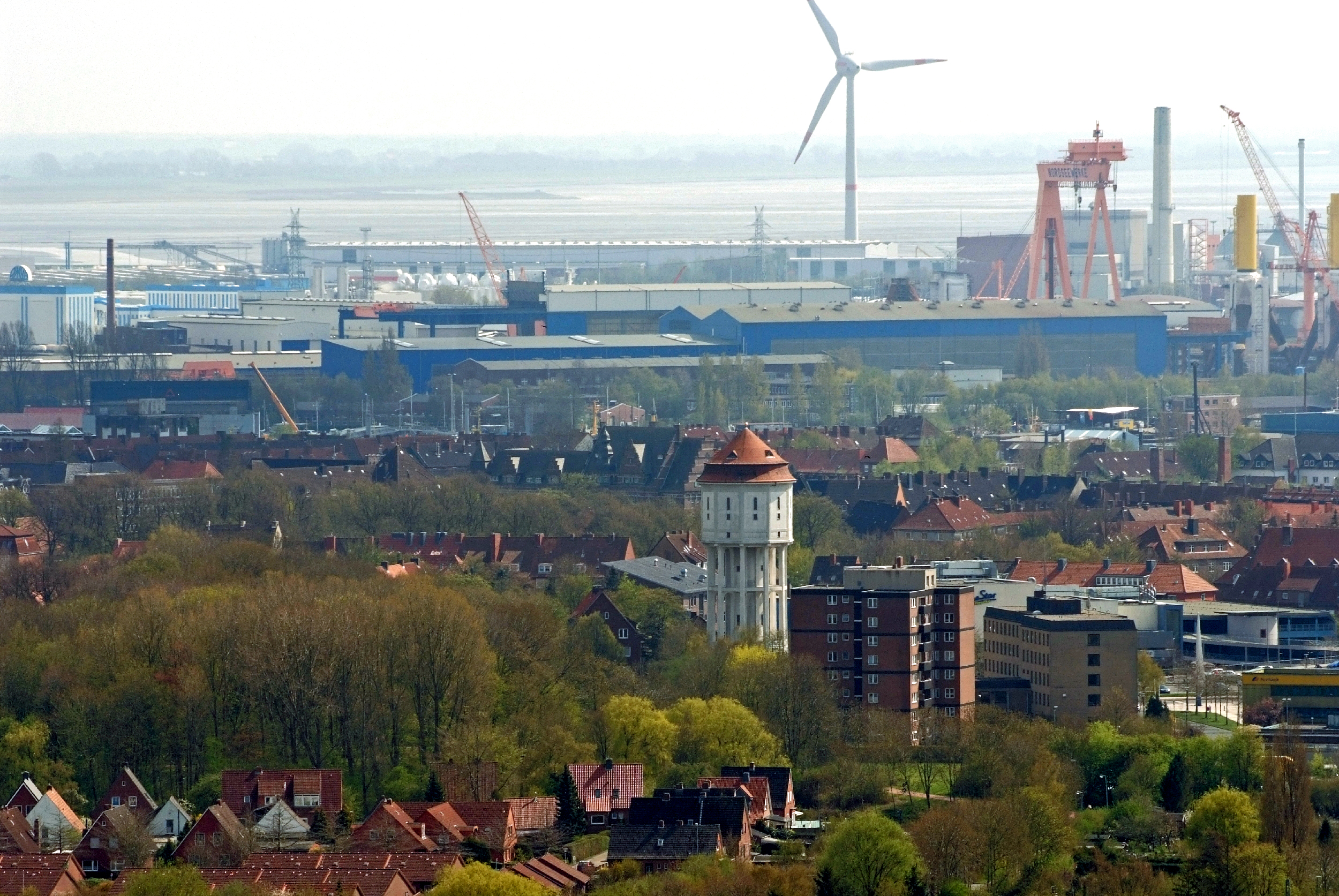 Fotoflug von Nordholz-Spieka nach Oldenburg und Papenburg: Emden